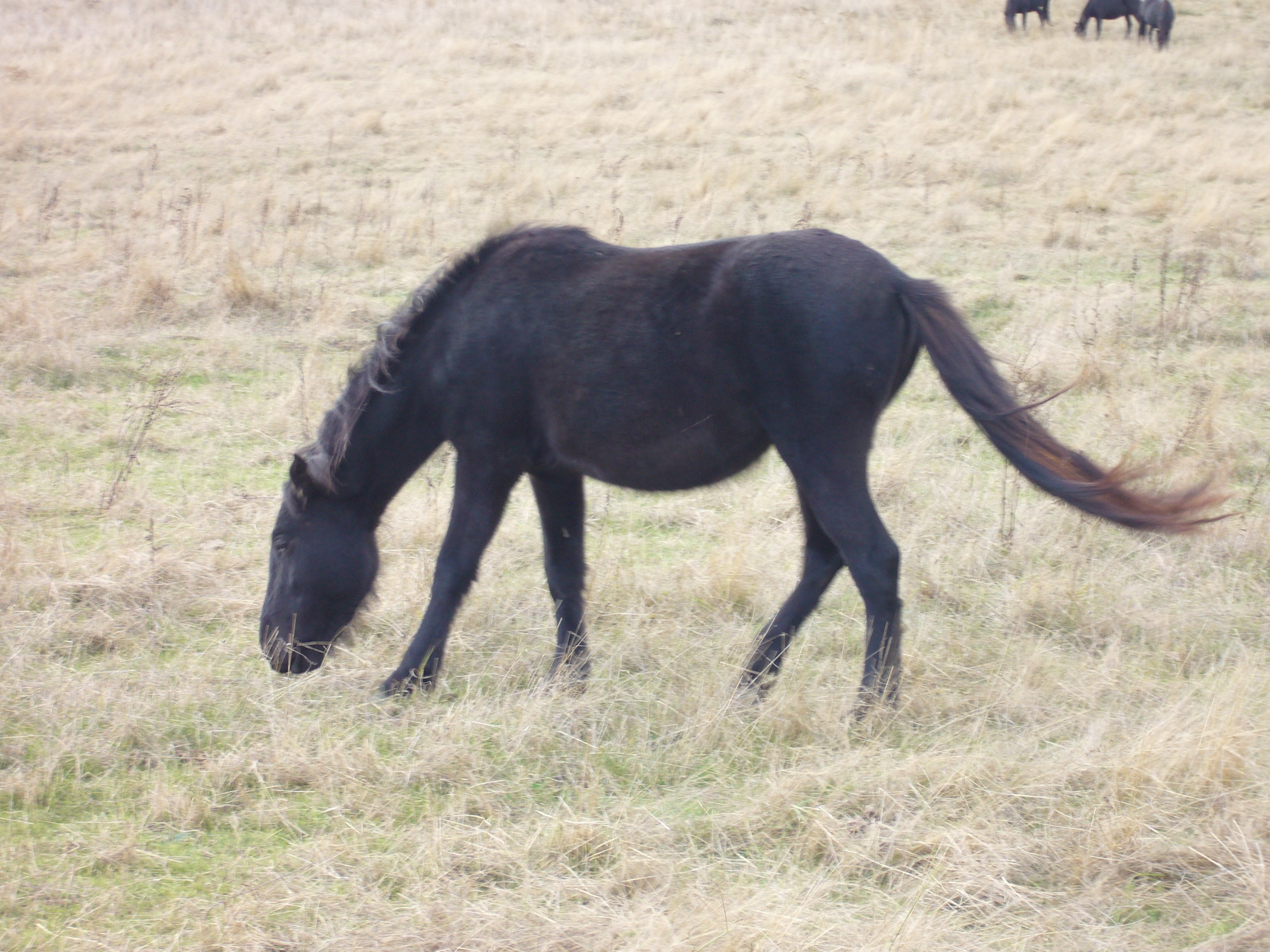 Lautzako zaldia, behorra Pancorboco mendian